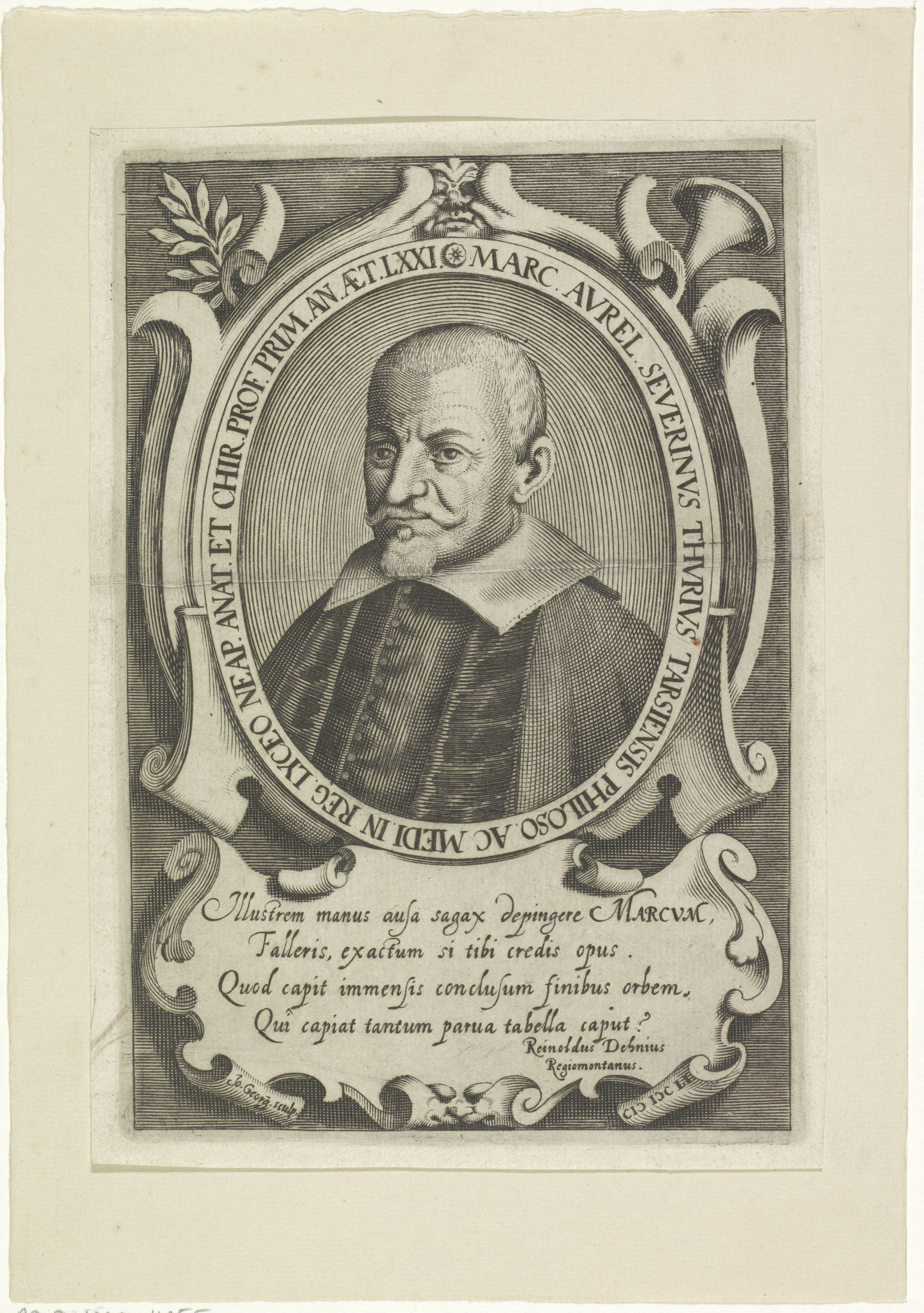 IdentificatieTitel(s): Portret van chirurg Marco Aurelio SeverinoObjecttype: prent Objectnummer: RP-P-1909-4955Opschriften / Merken: verzamelaarsmerk, verso, gestempeld: Lugt 2228VervaardigingVervaardiger: prentmaker: Giovanni Georgi (vermeld op object)Plaats vervaardiging: ItaliëDatering: 1651Fysieke kenmerken: gravureMateriaal: papier Techniek: graveren (drukprocedé)Afmetingen: plaatrand: h 180 mm × b 125 mmOnderwerpWat: historical personsbarber; surgeonWie: Marco Aurelio SeverinoVerwerving en rechtenVerwerving: aankoop 1905Copyright: Publiek domein